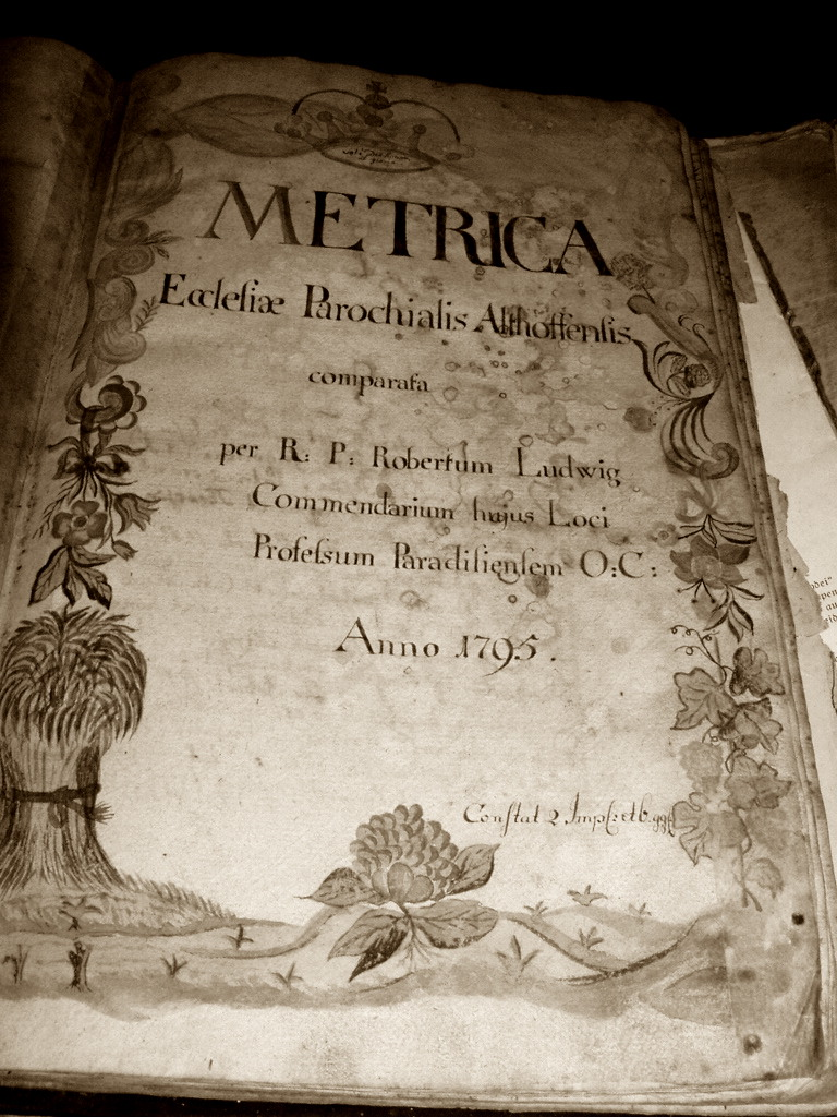 Księga parafialna - Stary Dwór - g. Trzciel - woj. lubuskie - Poland